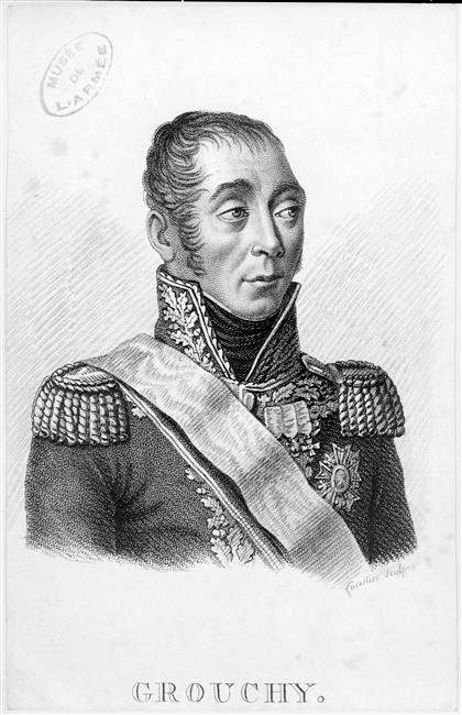 Emmanuel de Grouchy (1766-1847), Marschall von Frankreich